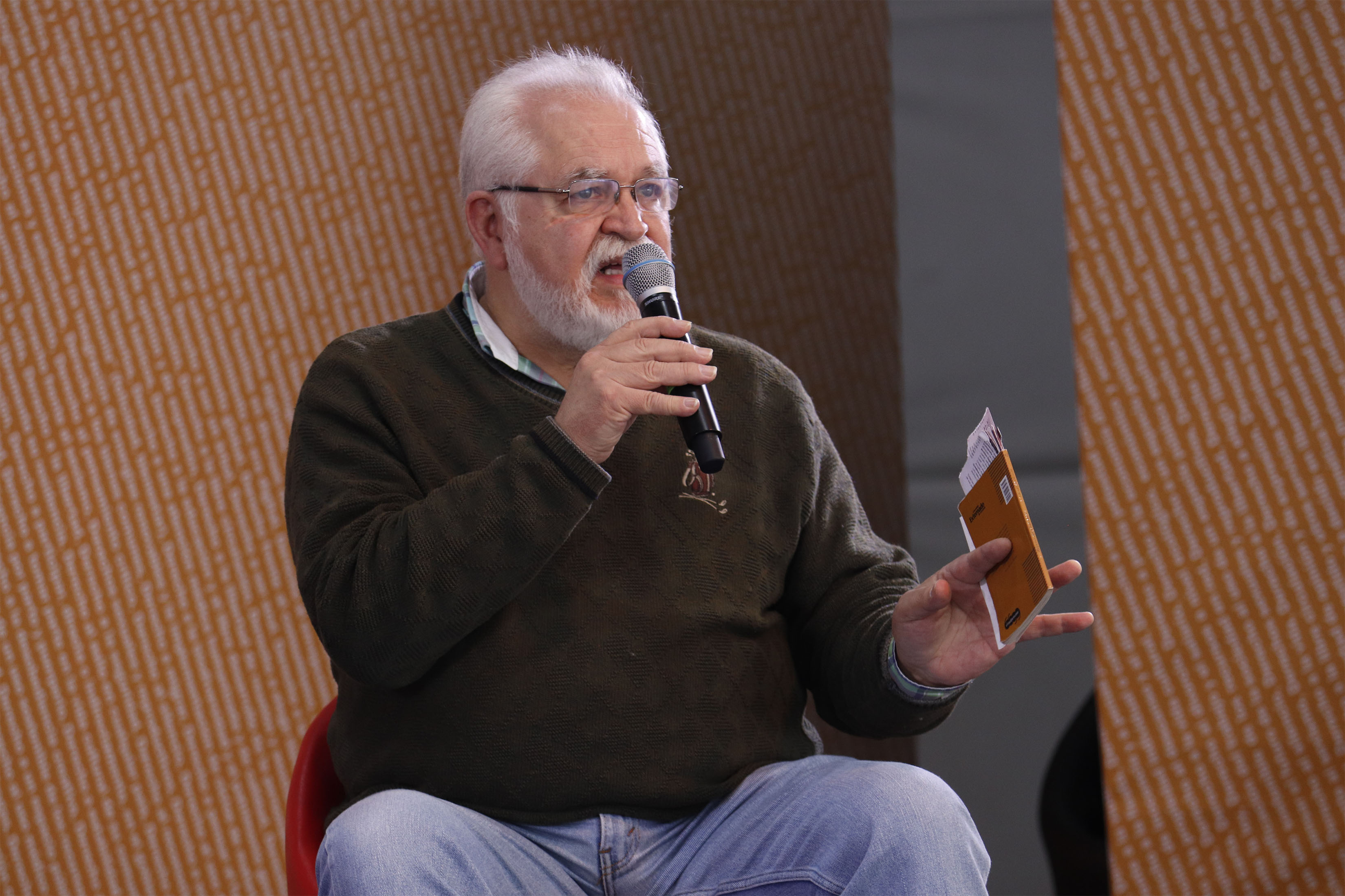 Sábado 13 de octubre 2018. En el foro Sergio Pitol, se realizó la lectura de poesía cubano-mexicana. Por parte de Cuba participaron: Odette Alonso, Margarita Sánchez, Ernesto Fundora y Waldo Leyva. Por México: Eduardo Langagne, Diana del Ángel y Julia Piastro.Fotografía: David Sánchez / Secretaría de Cultura CDMX.